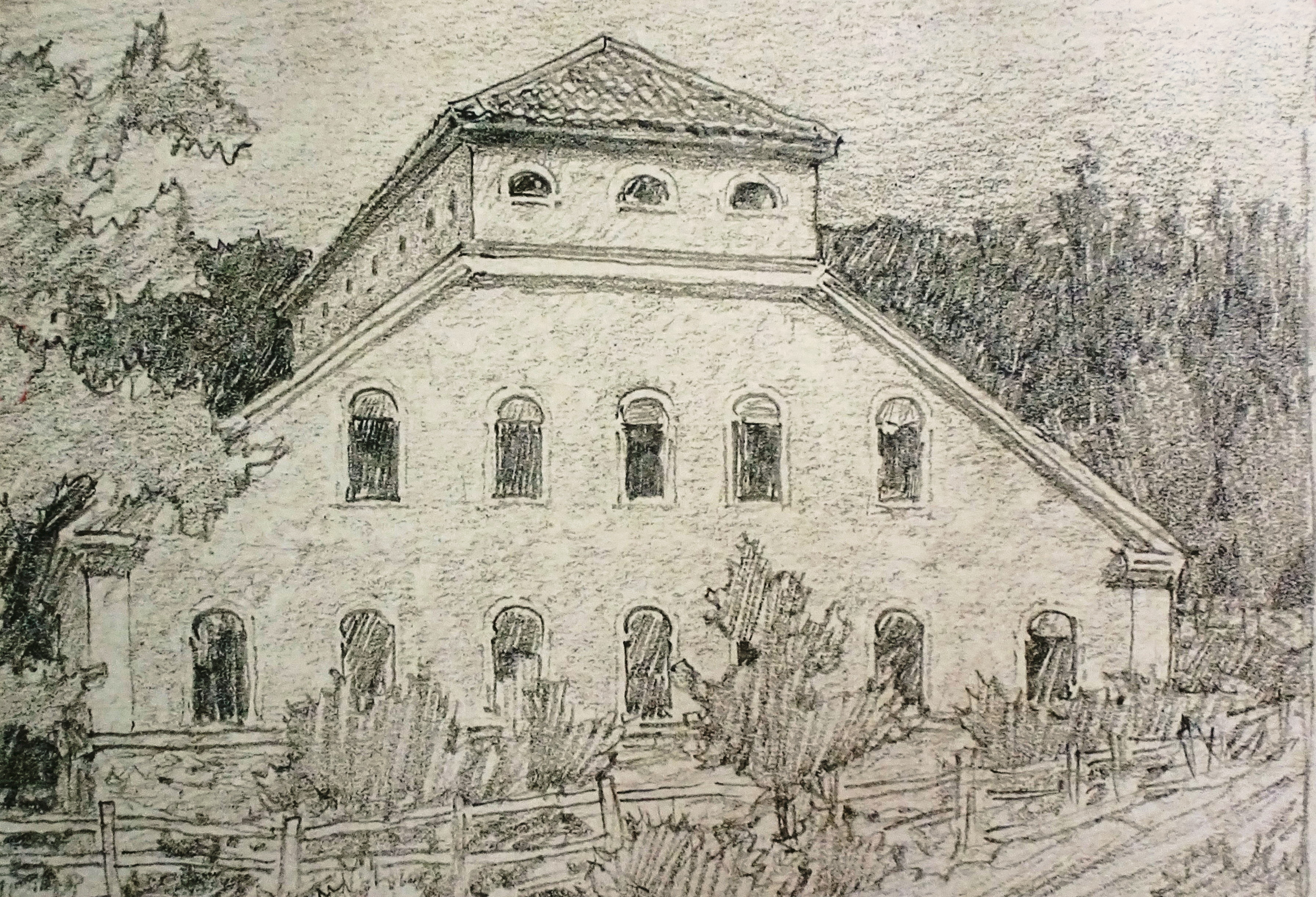 Björndammens masugn, kolteckning av Ferdinand Boberg